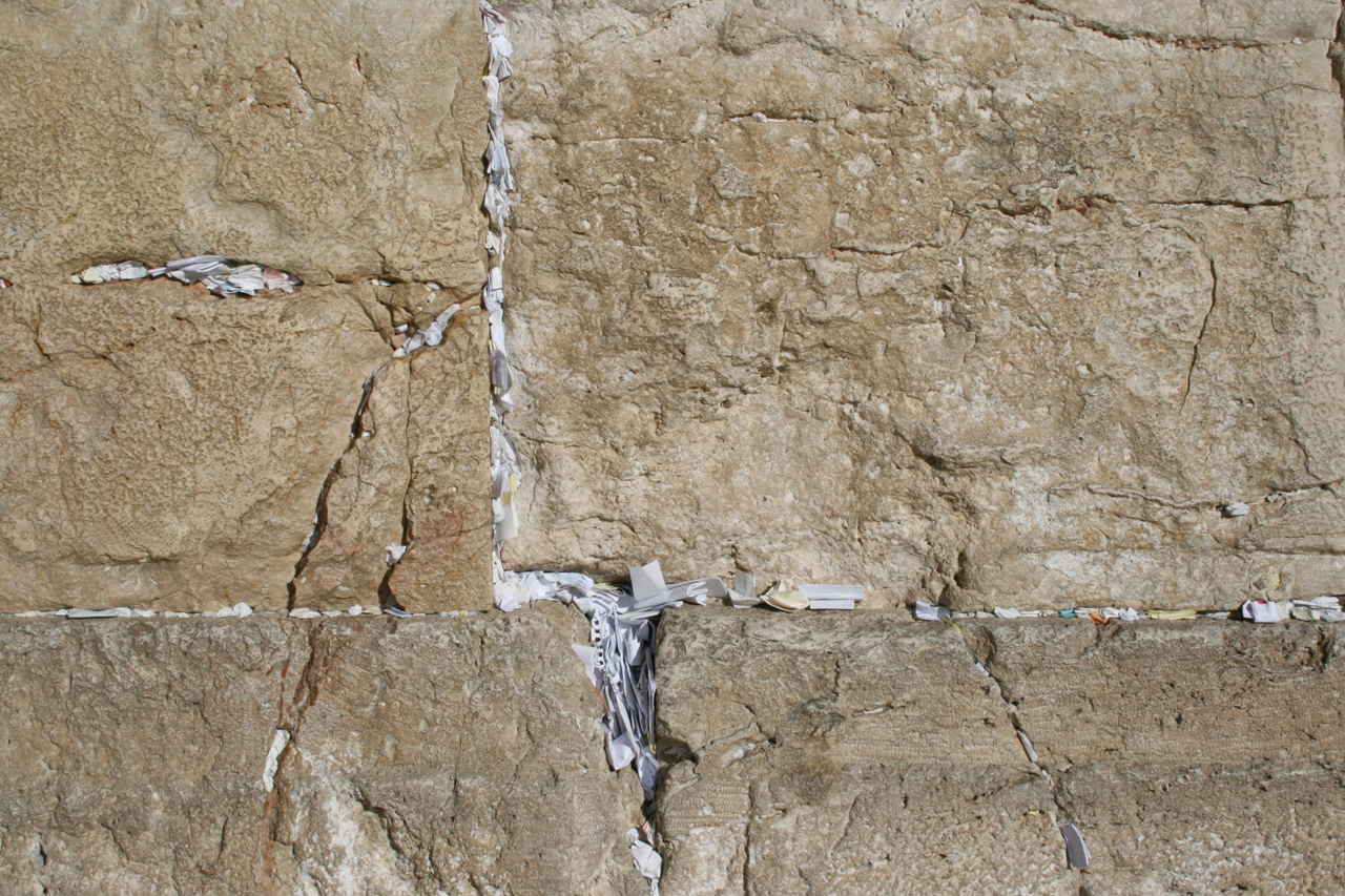 Détail du mur lamentataions à Jerusalem